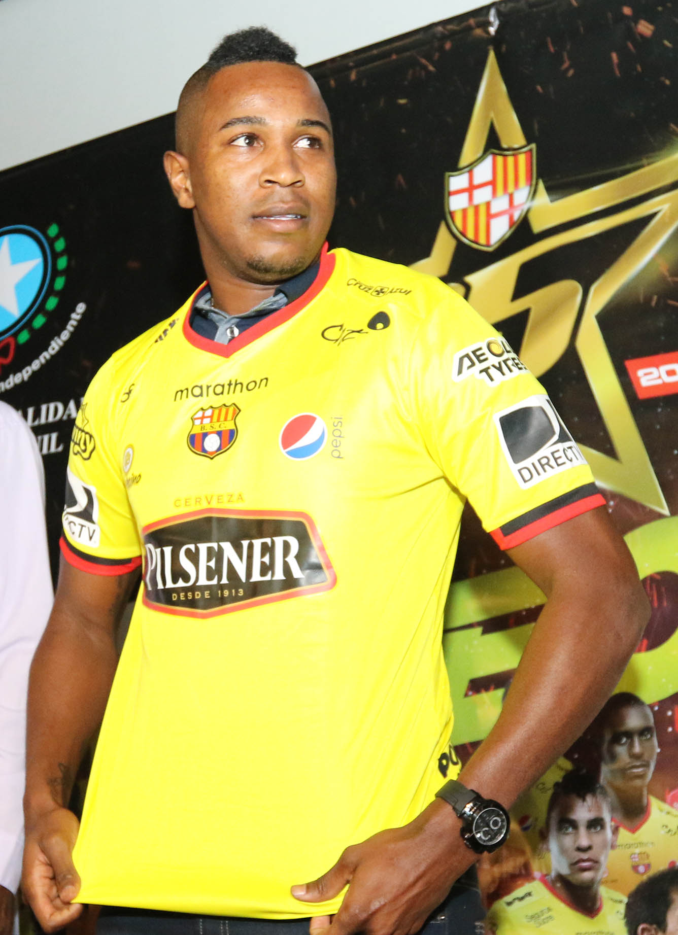 Guayaquil, lunes 09 de enero del 2017 (Andes).-El colombiano Jefferson Mena fue presentado por Barcelona, como refuerzo para la temporada 2017 del campeonato ecuatoriano. Foto:Andes/César Muñoz